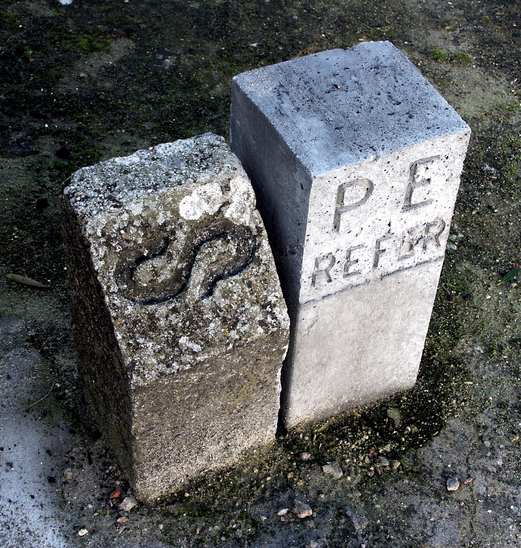 em frente à estação dos caminhos de ferro de Alcácer do Sal.